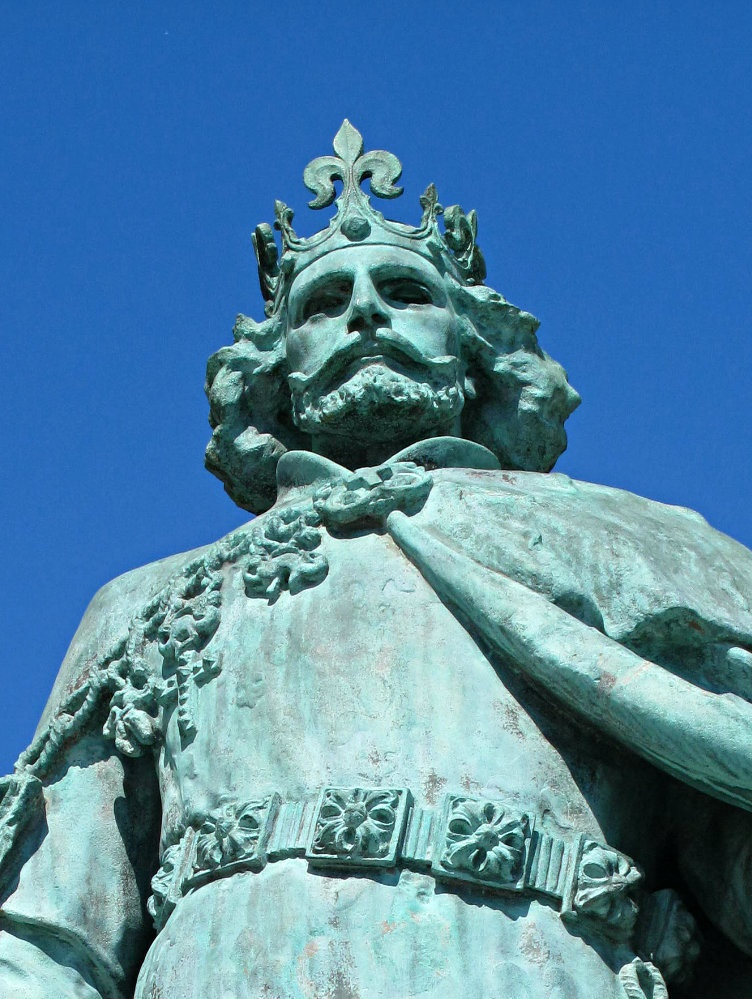 I. Lajos szobra a Hősök téri Millenniumi emlékművön, Budapesten